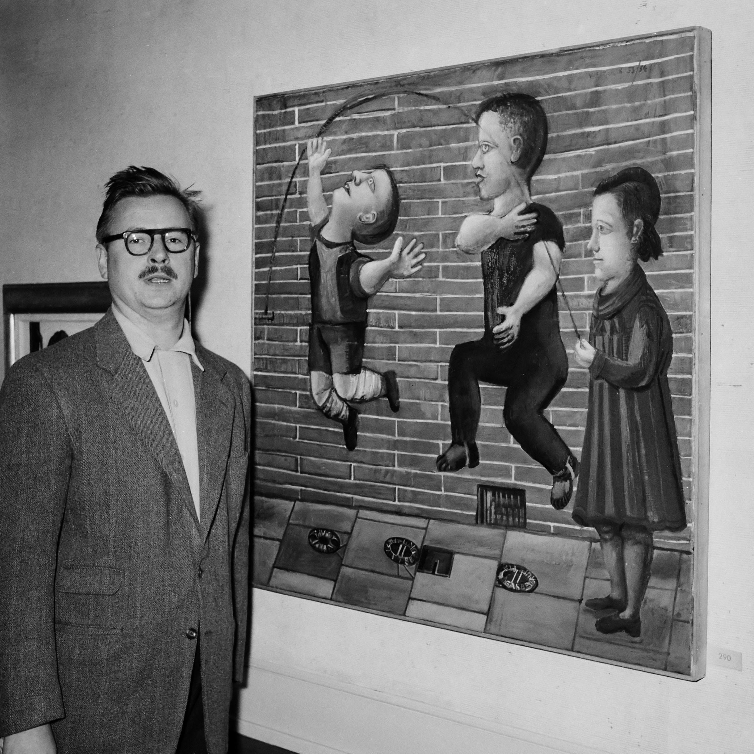 Uitreiking J. Marisprijs Den Haag , Co Westerik met stuk Touwtje Springen 30 juli 1955